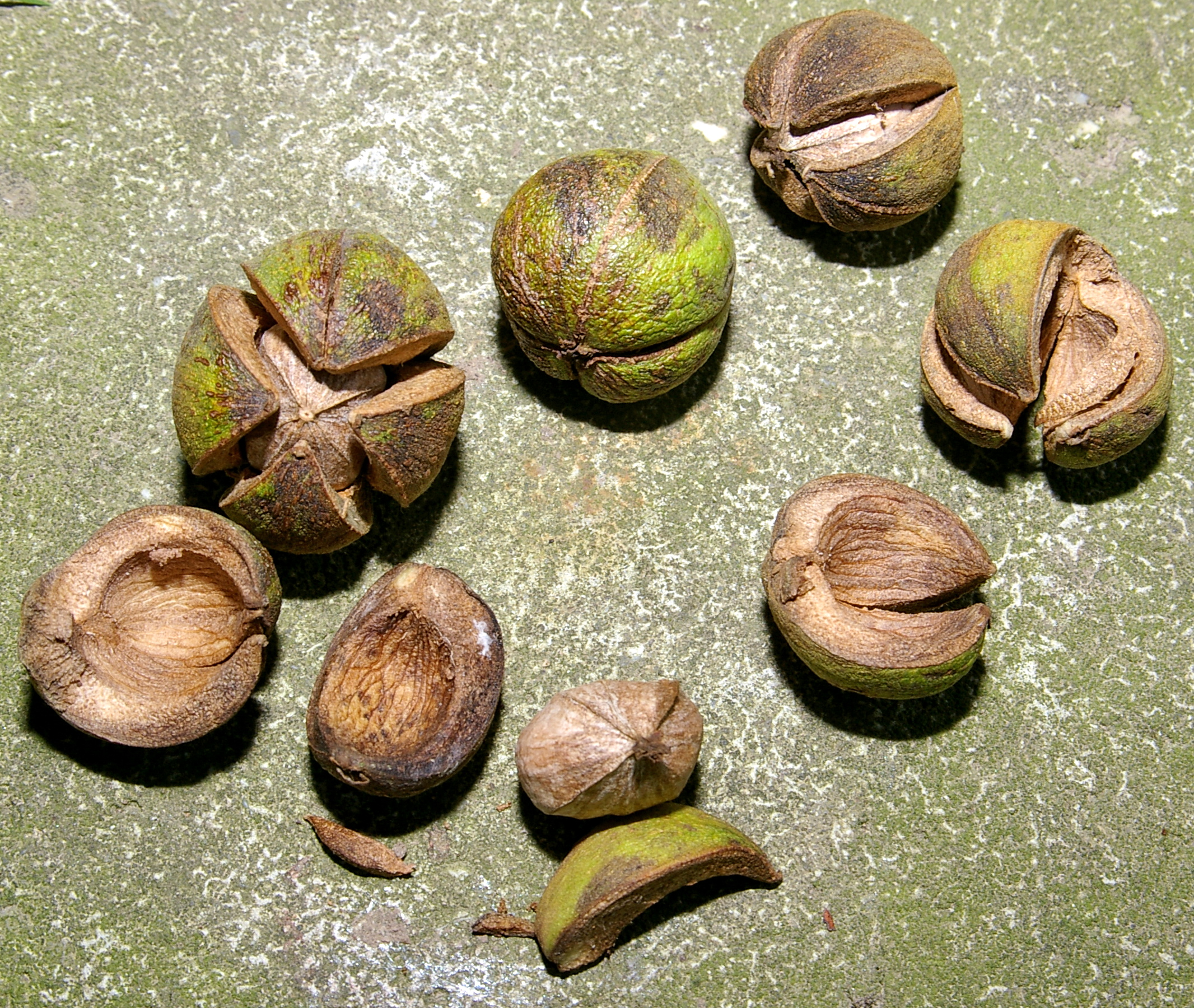 Schuppenrinden-Hickory, aufgenommen im Heltorfer Park zwischen Düsseldorf und Duisburg. Zur Bestimmung siehe im Archiv